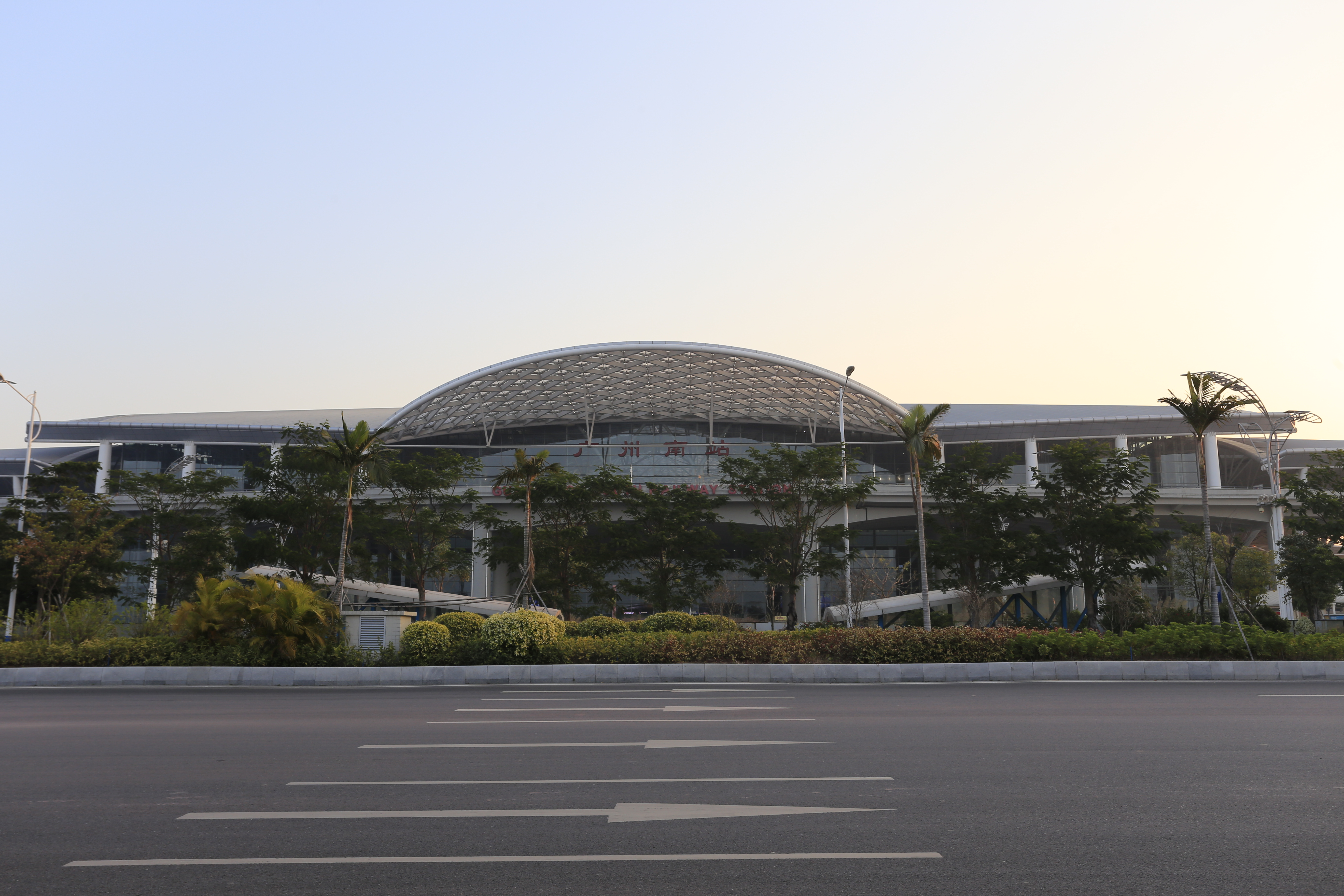 广州南站